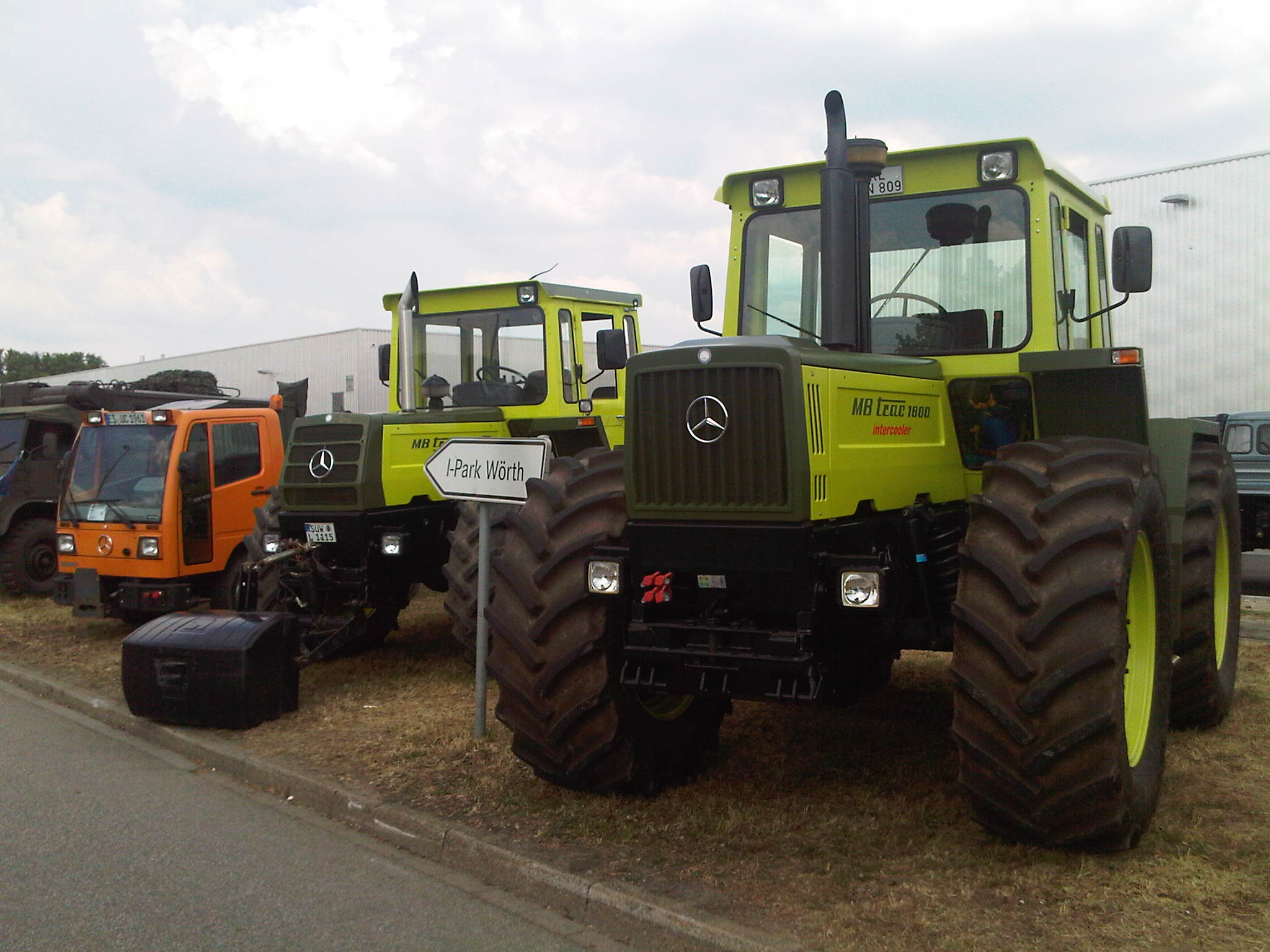 60 Jahre Unimog - Wörth 2011 044 MB-Trac 1800 intercooler